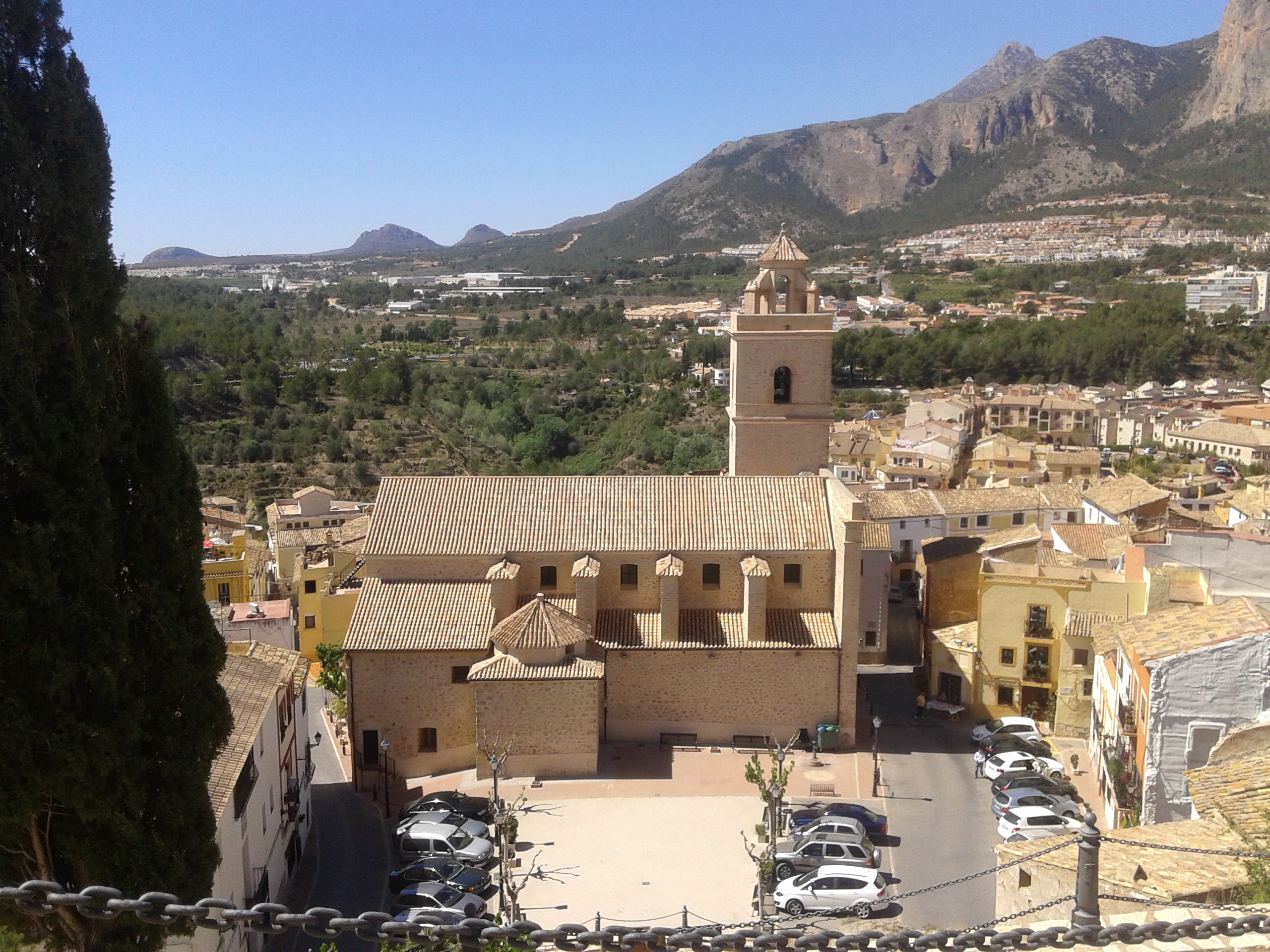 Iglesia